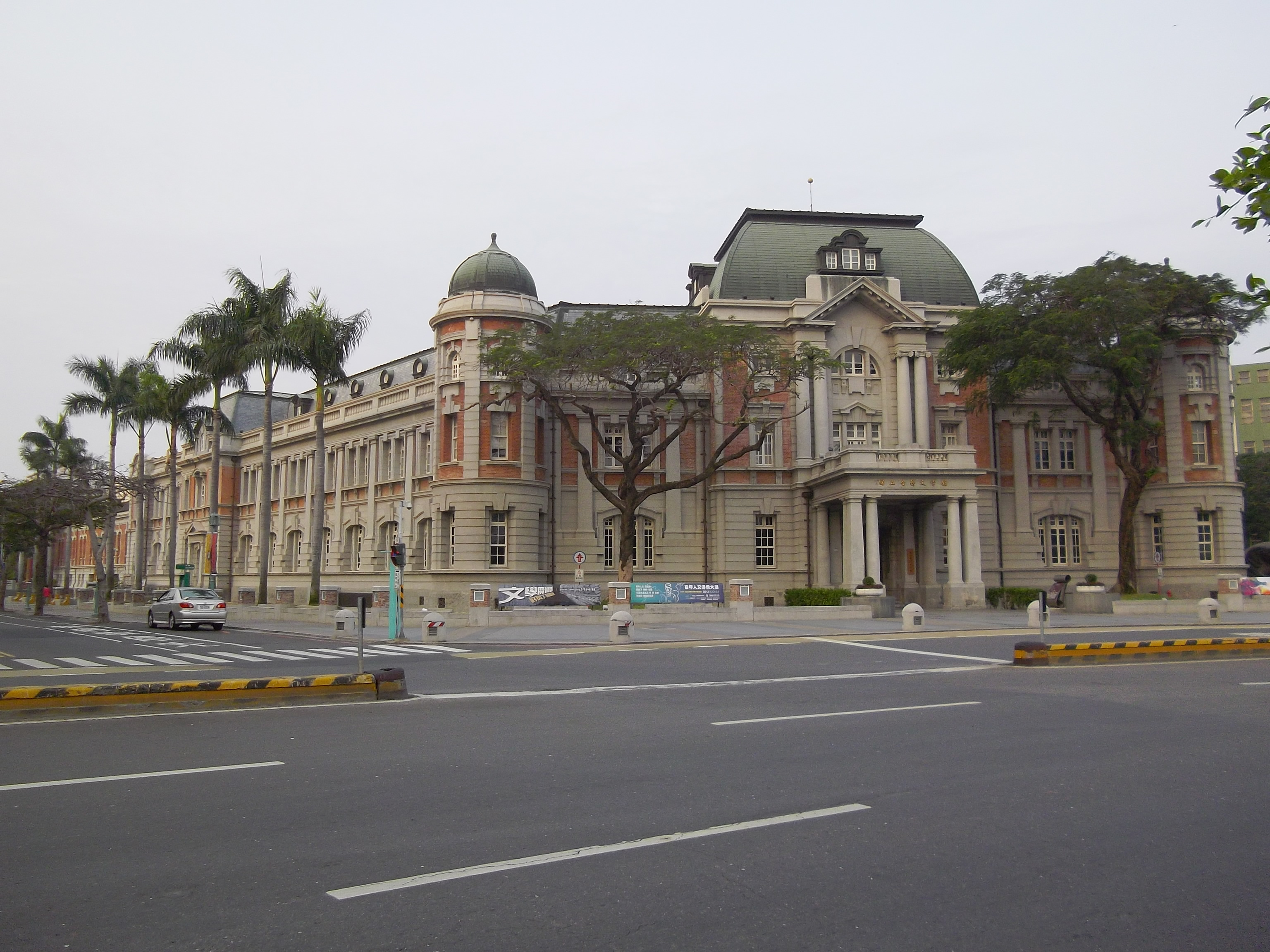 台灣文學館左側